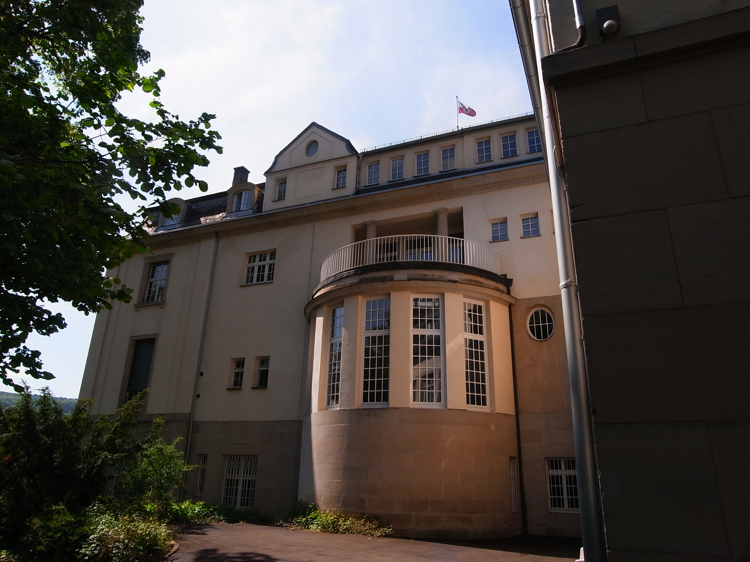 Nördlich passiert einer der Aufstiegswege zur Karlshöhe